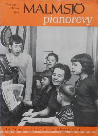 Malmsjö pianorevy 1 1962 (omslag). Inga Tobiasson med sina fem barn.